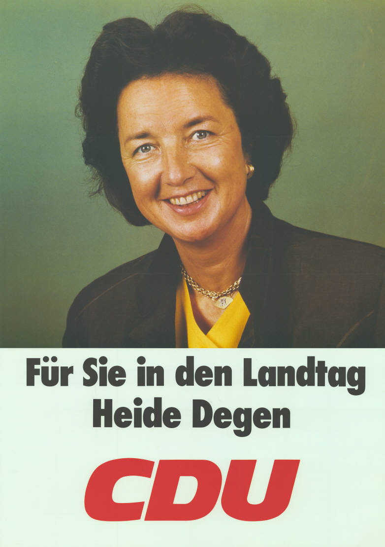 Für Sie in den Landtag Heide Degen CDUAbbildung:PorträtfotoKommentar:Rückseitig mit Kugelschreiber beschriftet.Plakatart:Kandidaten-/Personenplakat mit PorträtObjekt-Signatur:10-007 : 707Bestand:Landtagswahlplakate Hessen (10-007)GliederungBestand10-18:Landtagswahlplakate Hessen (10-007) » CDULizenz:KAS/ACDP 10-007 : 707 CC-BY-SA 3.0 DE